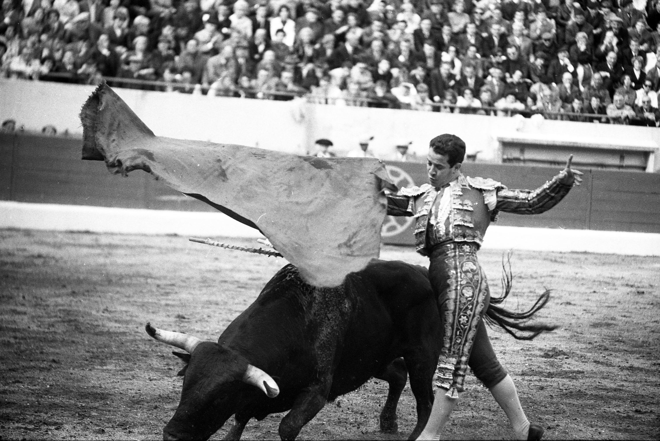 Corrida aux Arènes du Soleil d'Or (quartier des Arènes). 8 mai 1966. Scène de tauromachie. Au 1er plan Diego Puerta effectue une passe de cape avec le taureau, cape à l'horizontale, le taureau passe sous la cape ; en arrière-plan gradins avec spectateurs. Observation: Pour connaître les caractéristiques du taureau (âge, poids...), voir dans le fonds bibliothèque le document intitulé "Arènes du Soleil d'Or (avril 1955 - octobre 1966)", cote 2397. Ce document compile les copies des notes manuscrites prises lors des corridas.